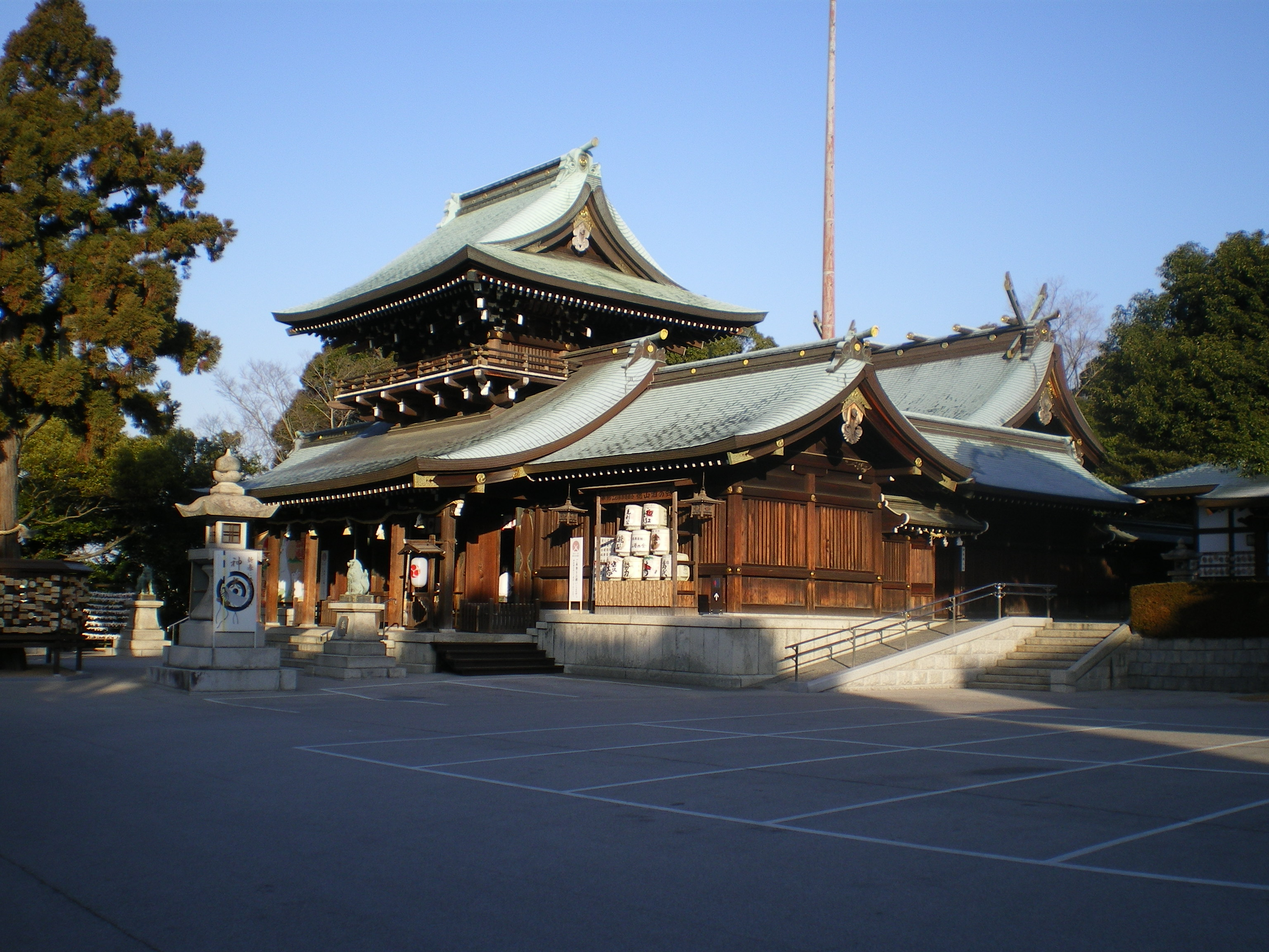 遠石八幡宮